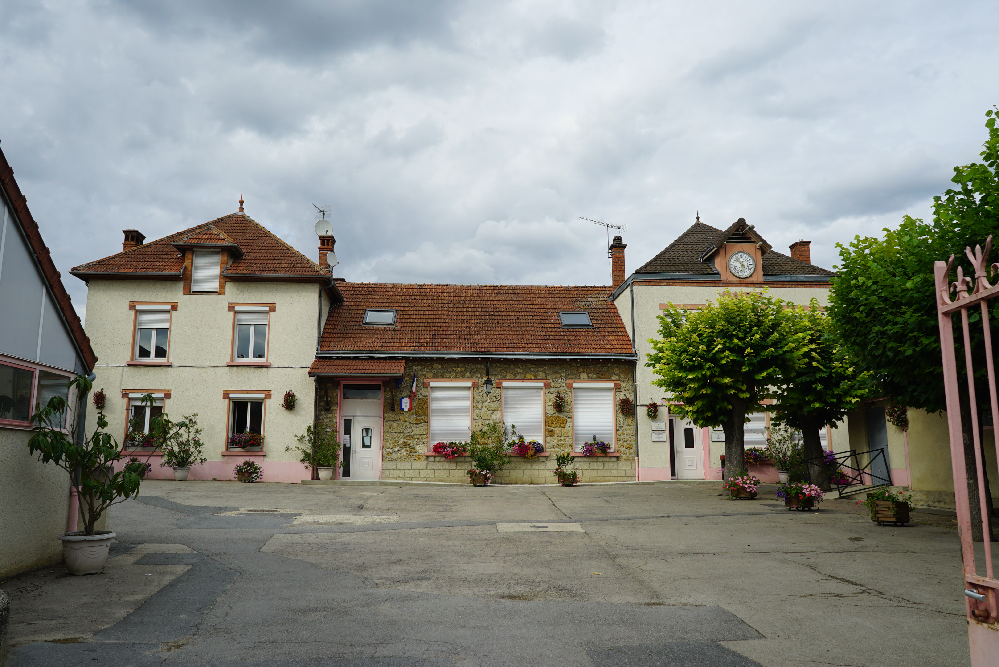 dans le village.